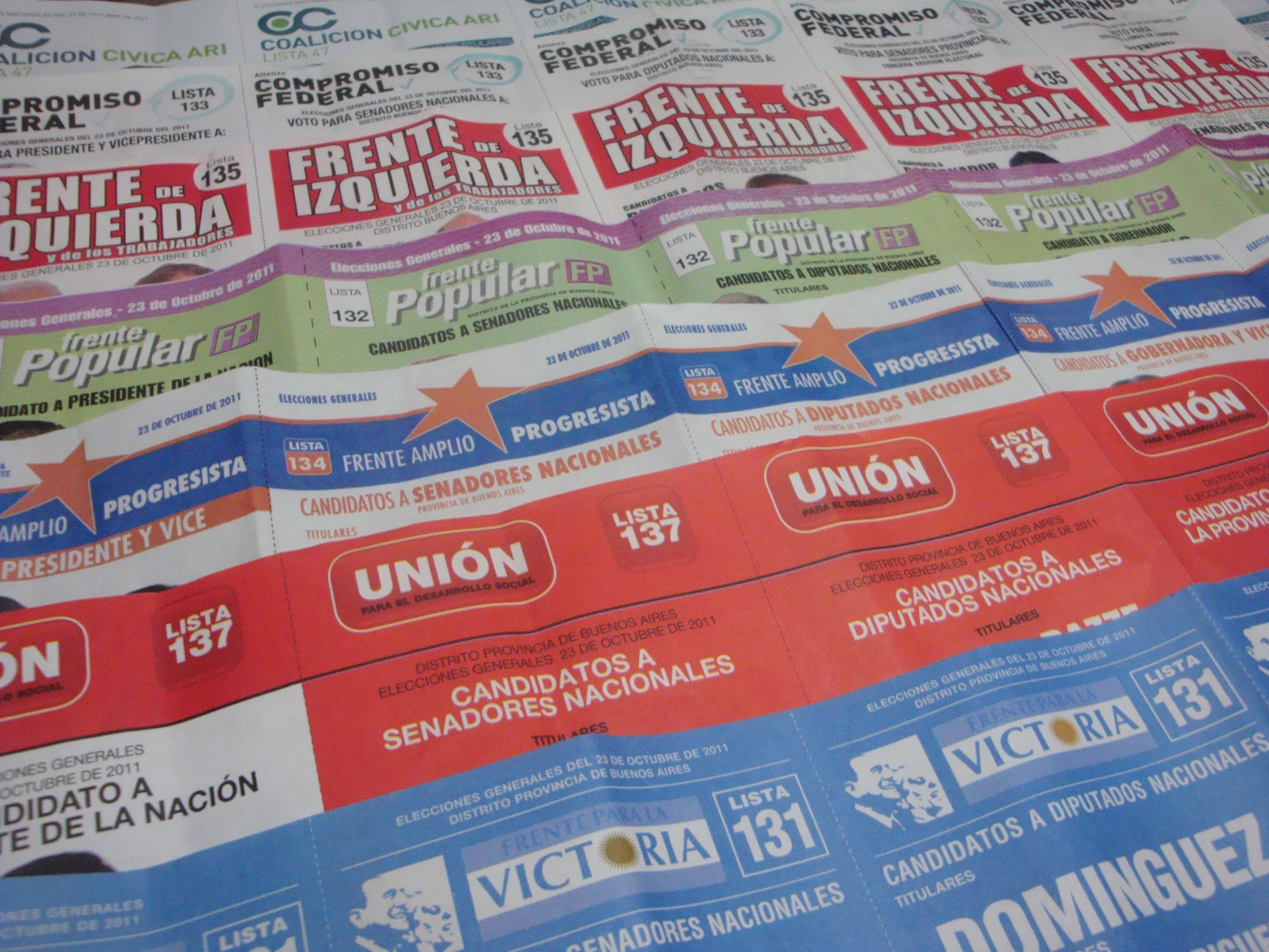 Boletas electorales de todos los partidos políticos que participaron de las elecciones presidenciales de Argentina de 2011.